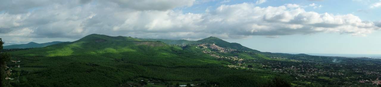 Alban Hills